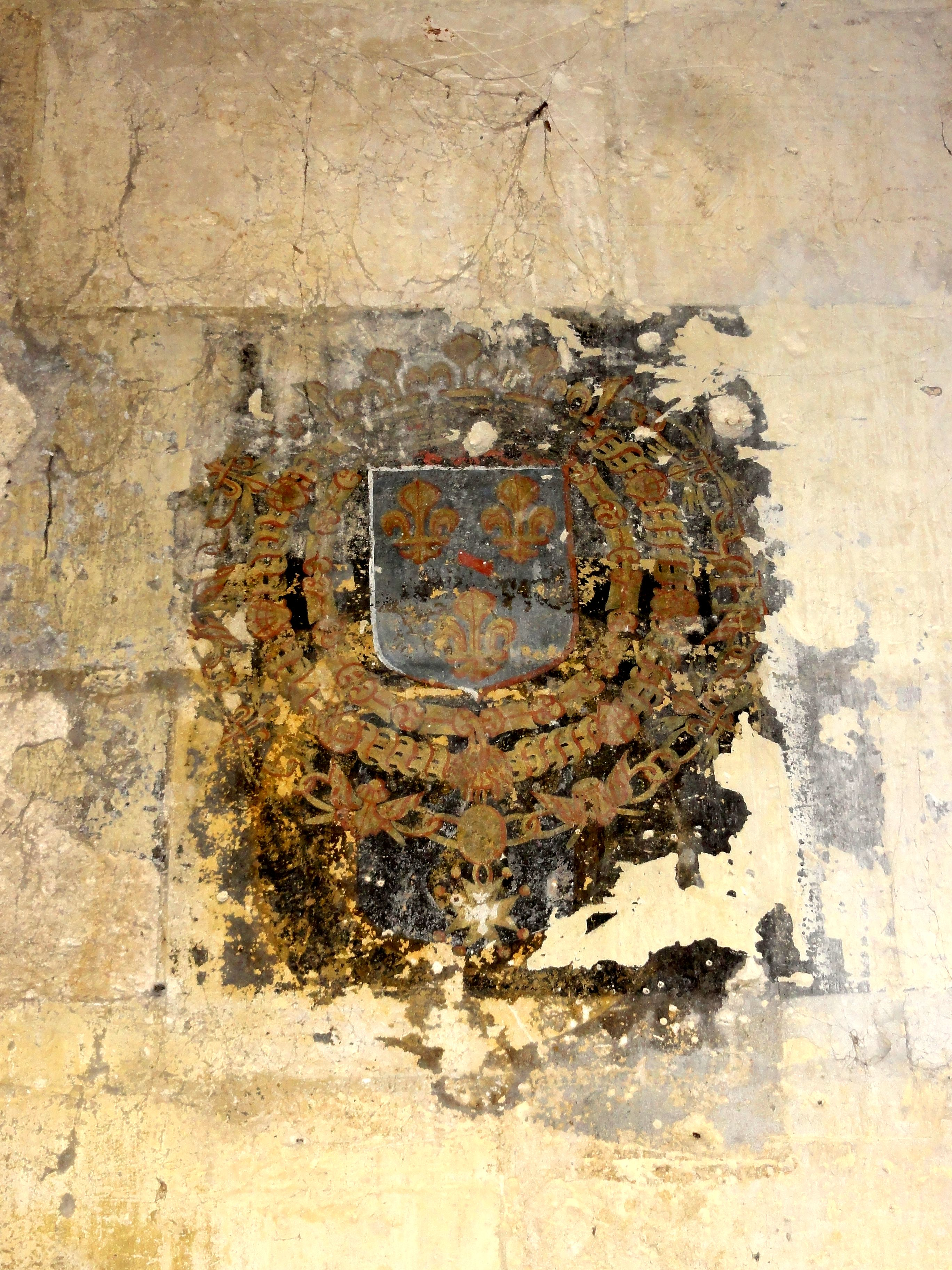 Nef, mur occidental, vestige de la litre à gauche du portail.